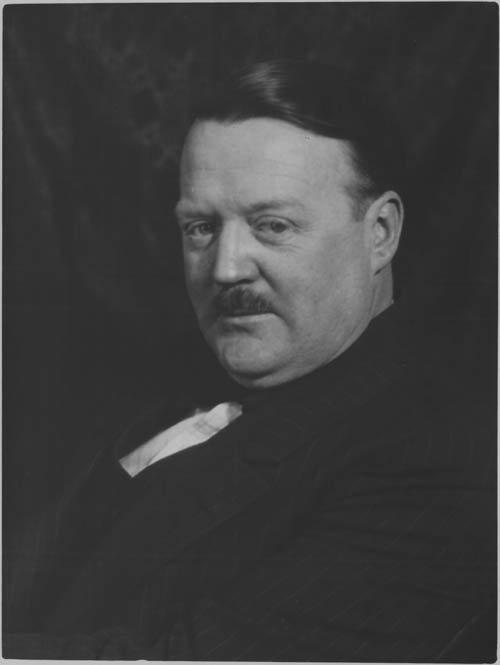 Franz H. Johnston, A.R.C.A.